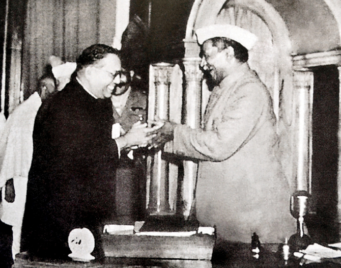 संविधानाच्या मसूदा समितीचे अध्यक्ष डॉ. बाबासाहेब आंबेडकर राजेंद्र प्रसादांना सविधानाचा शेवटचा मसूदा प्रदान करतांना.